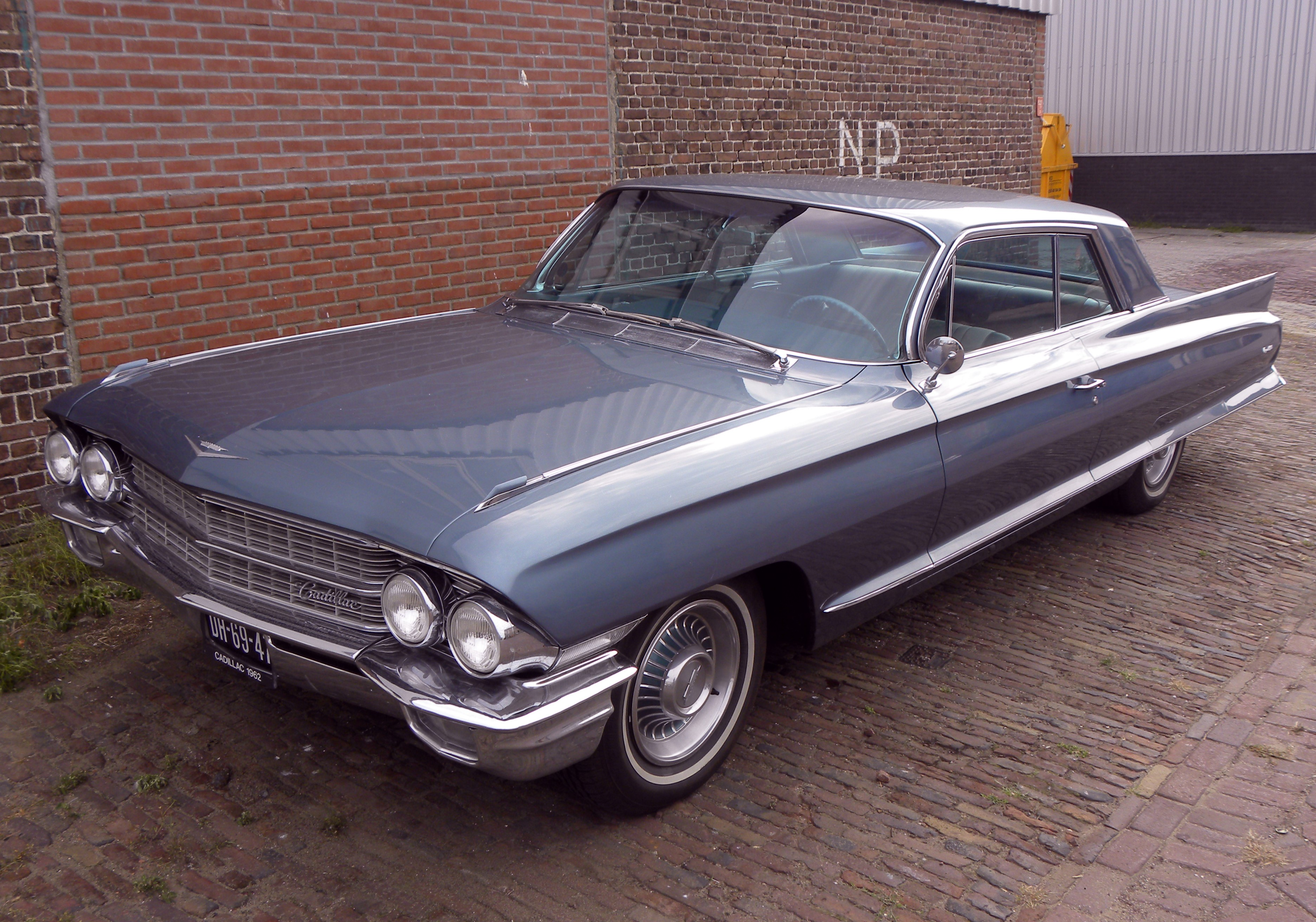 Cadillac coupe de ville 1962